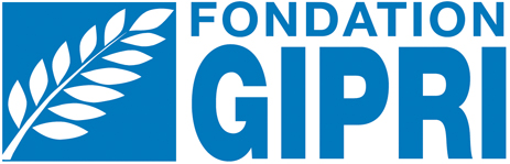 Logo GIPRI